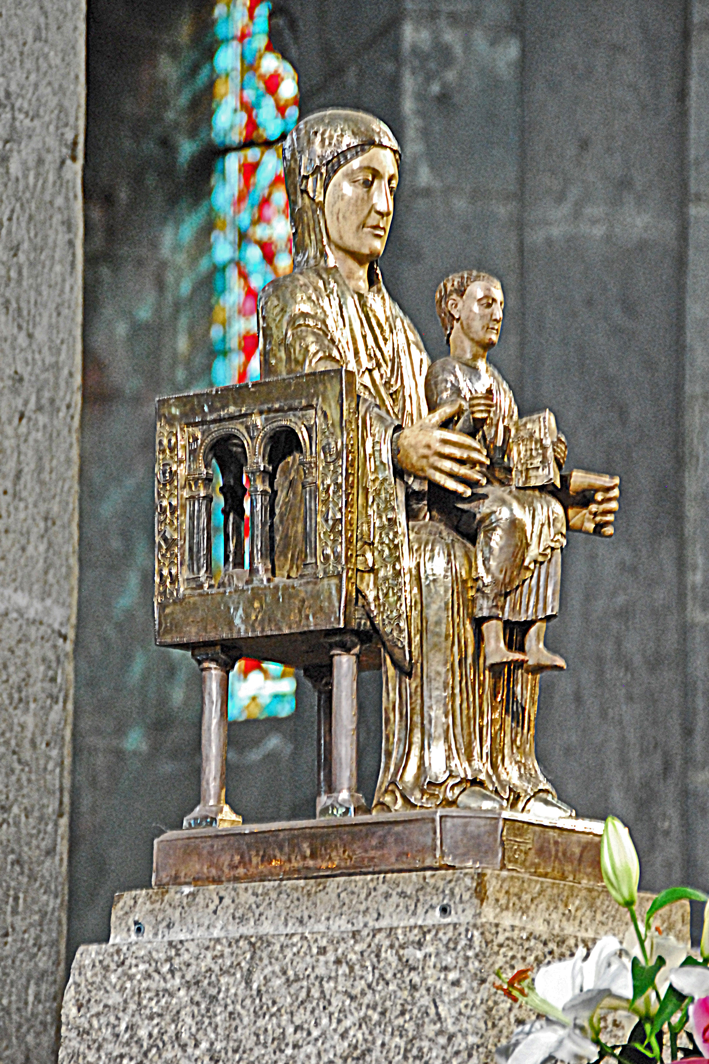 N.-D. d'Orcival, Madonna, rechte Seite